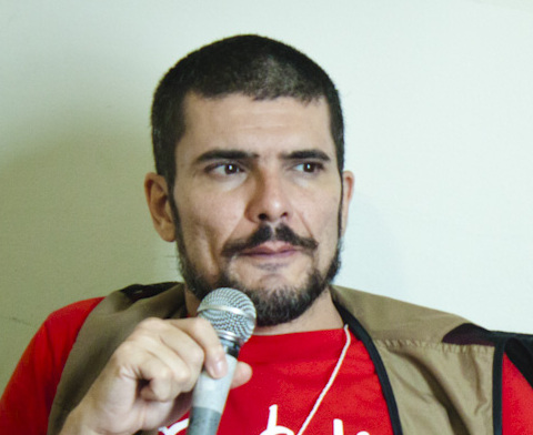 Conversa com Carlos Latuff